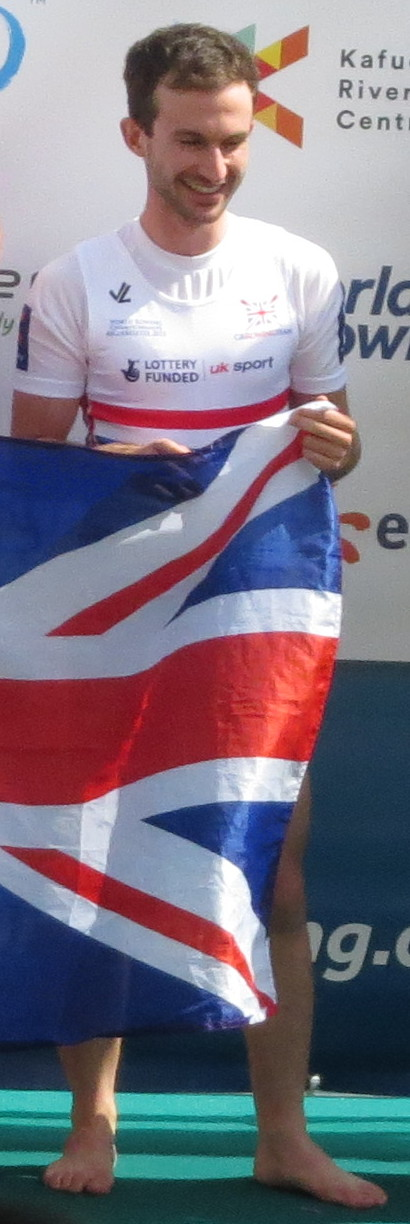 Podium du M2+ GBR : REILLY-O'DONNELL, Nathaniel, TARRANT, Matthew, FIELDMAN, Henry GER : SCHNEIDER, Jakob ERNSTING, Clemens WIESEN, Jonas SER : PIVAC, Viktor MACKOVIC, Martin, MLADENOVIC, Luka